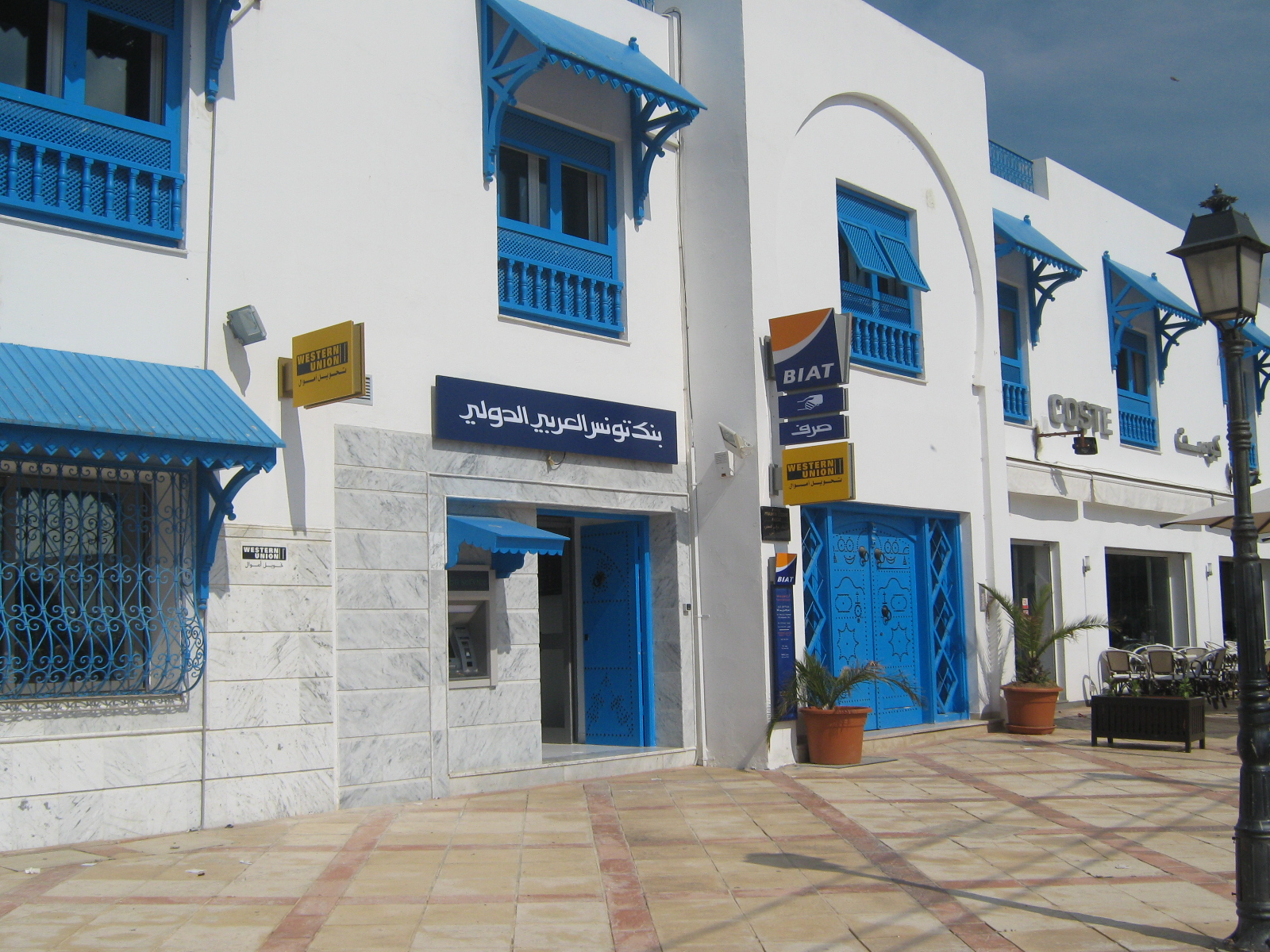 Agence de la banque BIAT